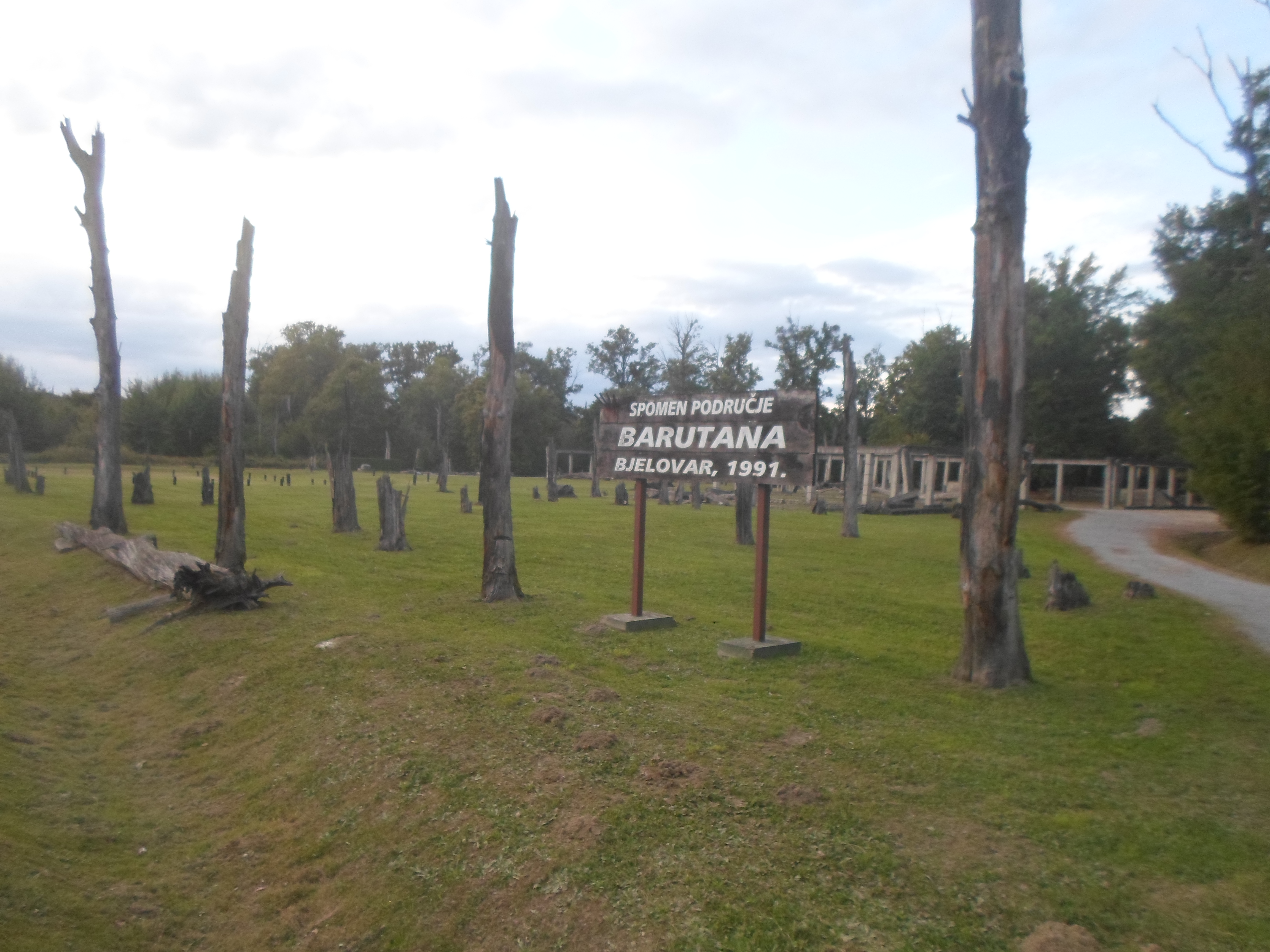 Barutana Bjelovar